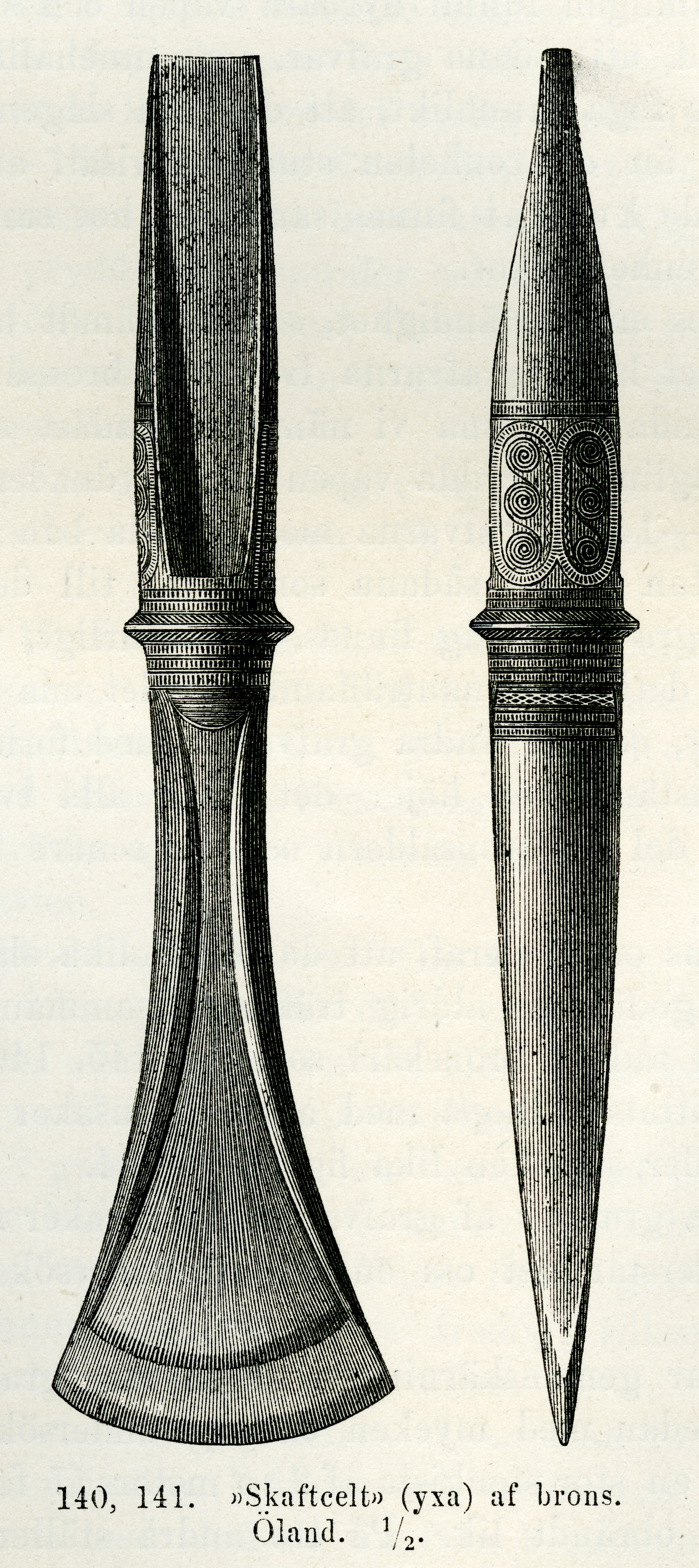 Avsatsyxa av brons från Öland, Sverige. Daterad till bronsålderns period 2. Träsnitt figur 140 och 141 på sidan 110 i Sveriges hednatid, samt medeltid, förra skedet, från år 1060 till år 1350 (1877) av Oscar Montelius.